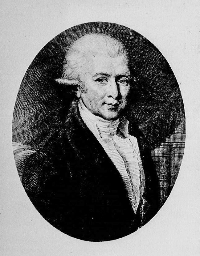 Christophe-Guillaume Koch, Biographies alsaciennes avec portraits en photographie, série 1